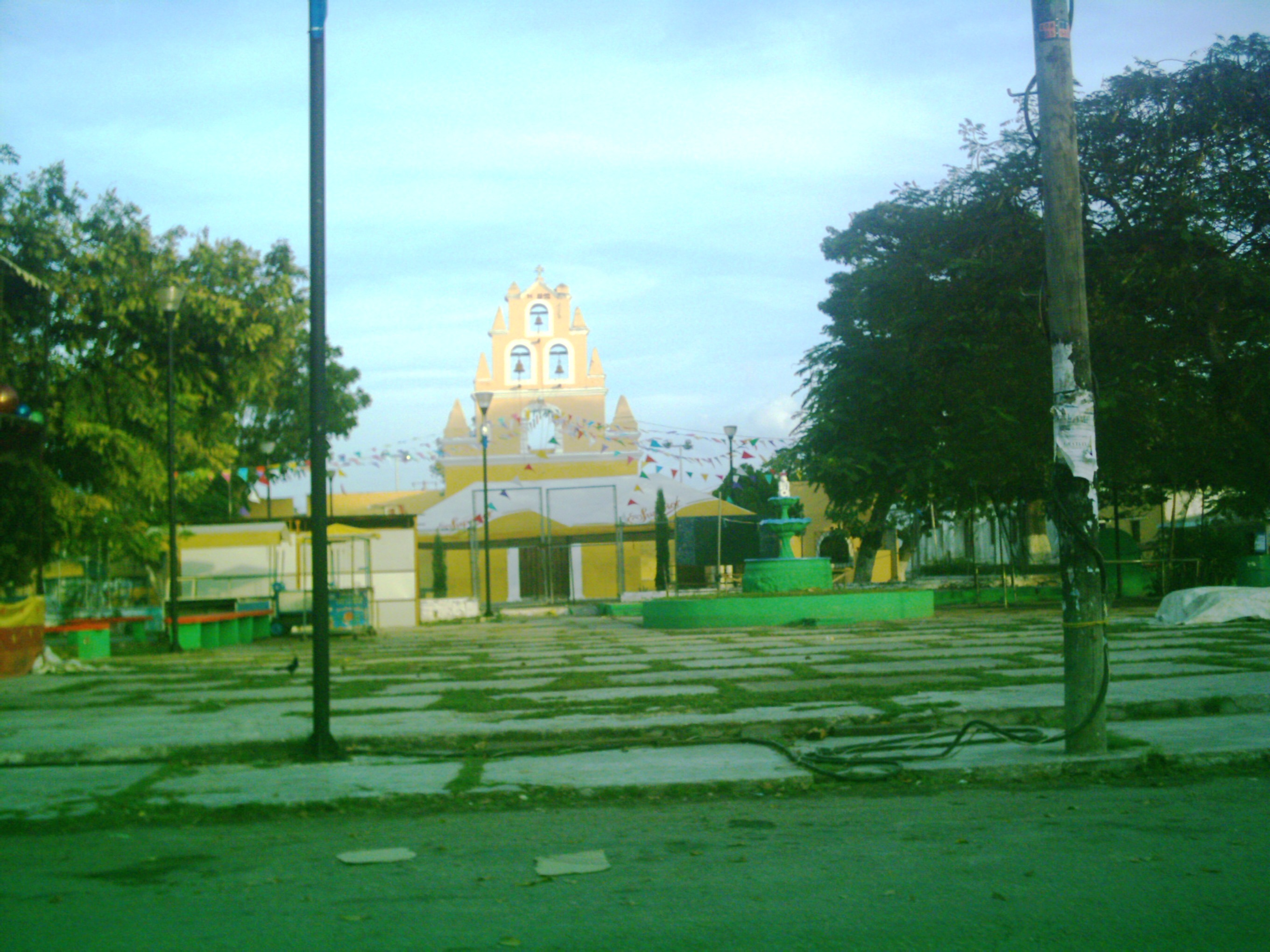 Capilla ubicada en el parque principal de Komchén, Yucatán.